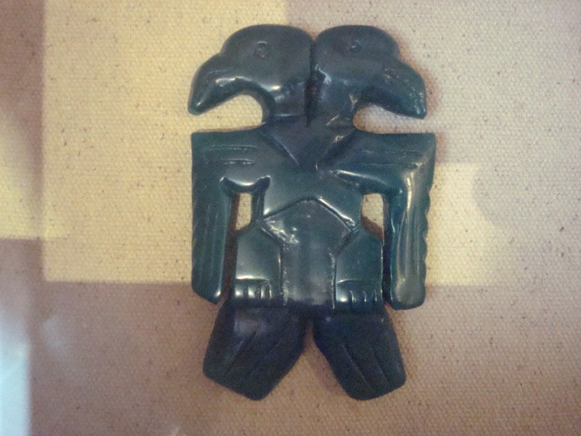 Objeto de jade precolombino. Parque Nacional Volcán Poás, Costa Rica.